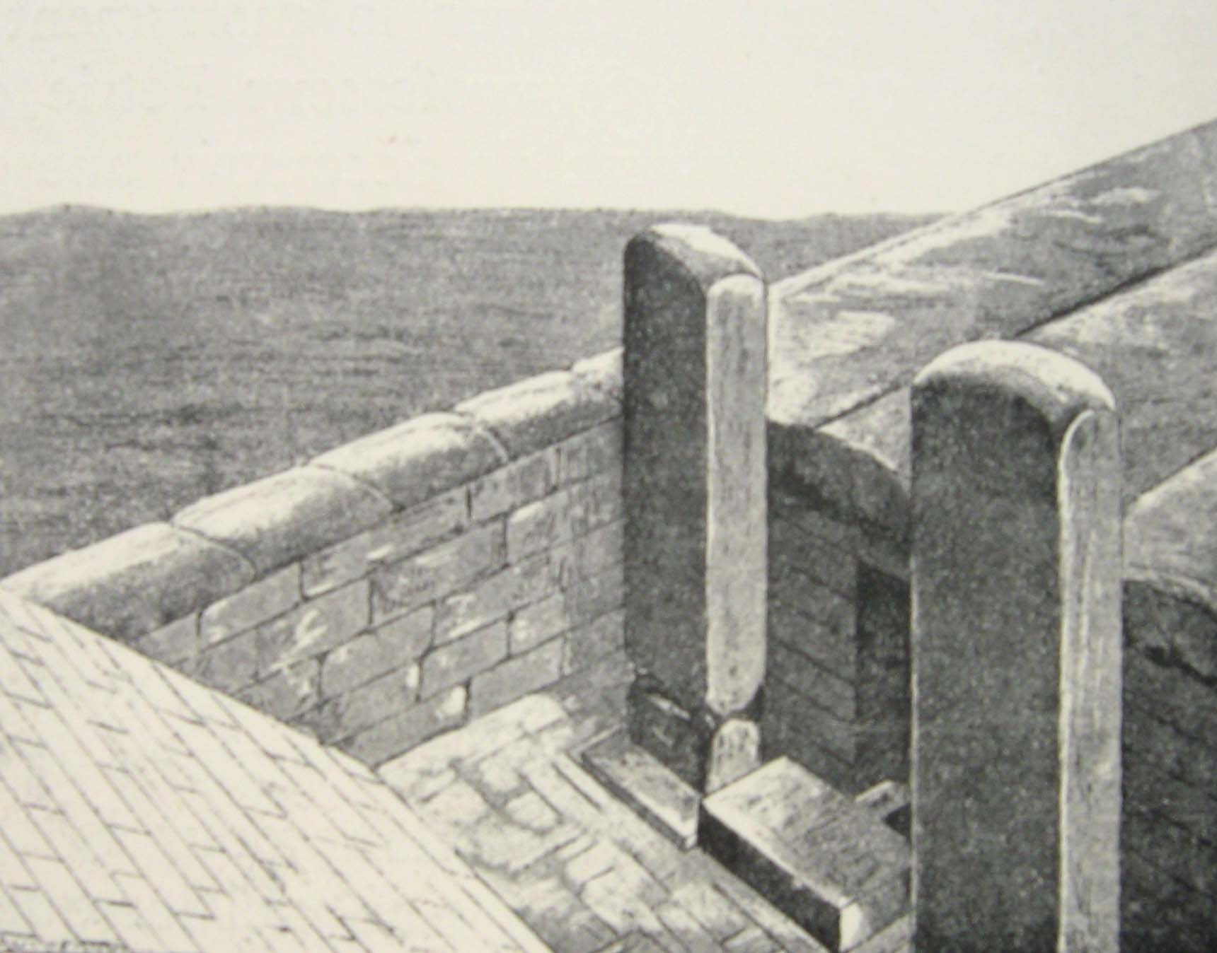 reconstitution du petit temple de la pyramide sud de Dahchour